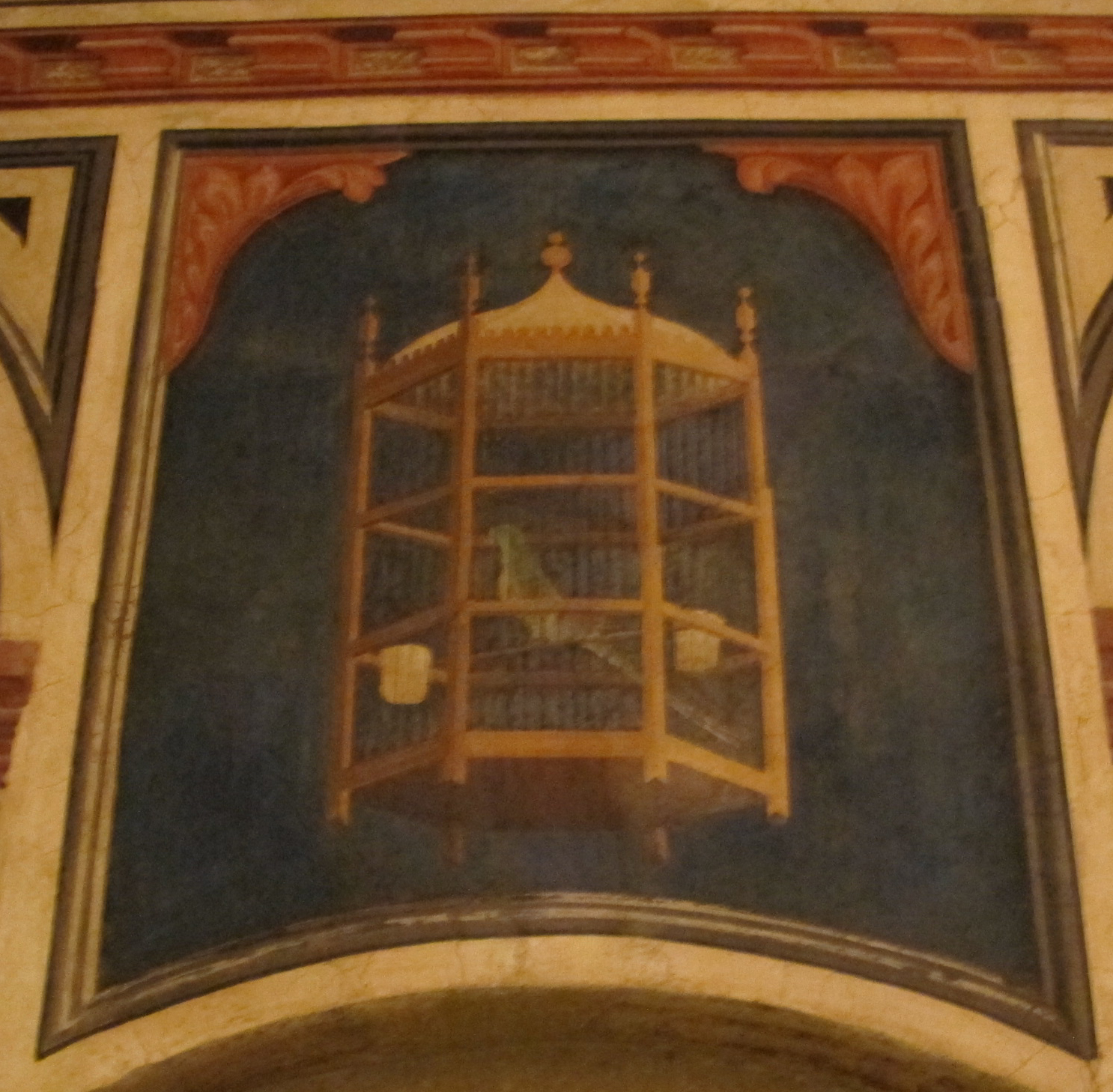 Palazzo trinci, ponte sospeso, a02.1, gabbietta con pappagallo